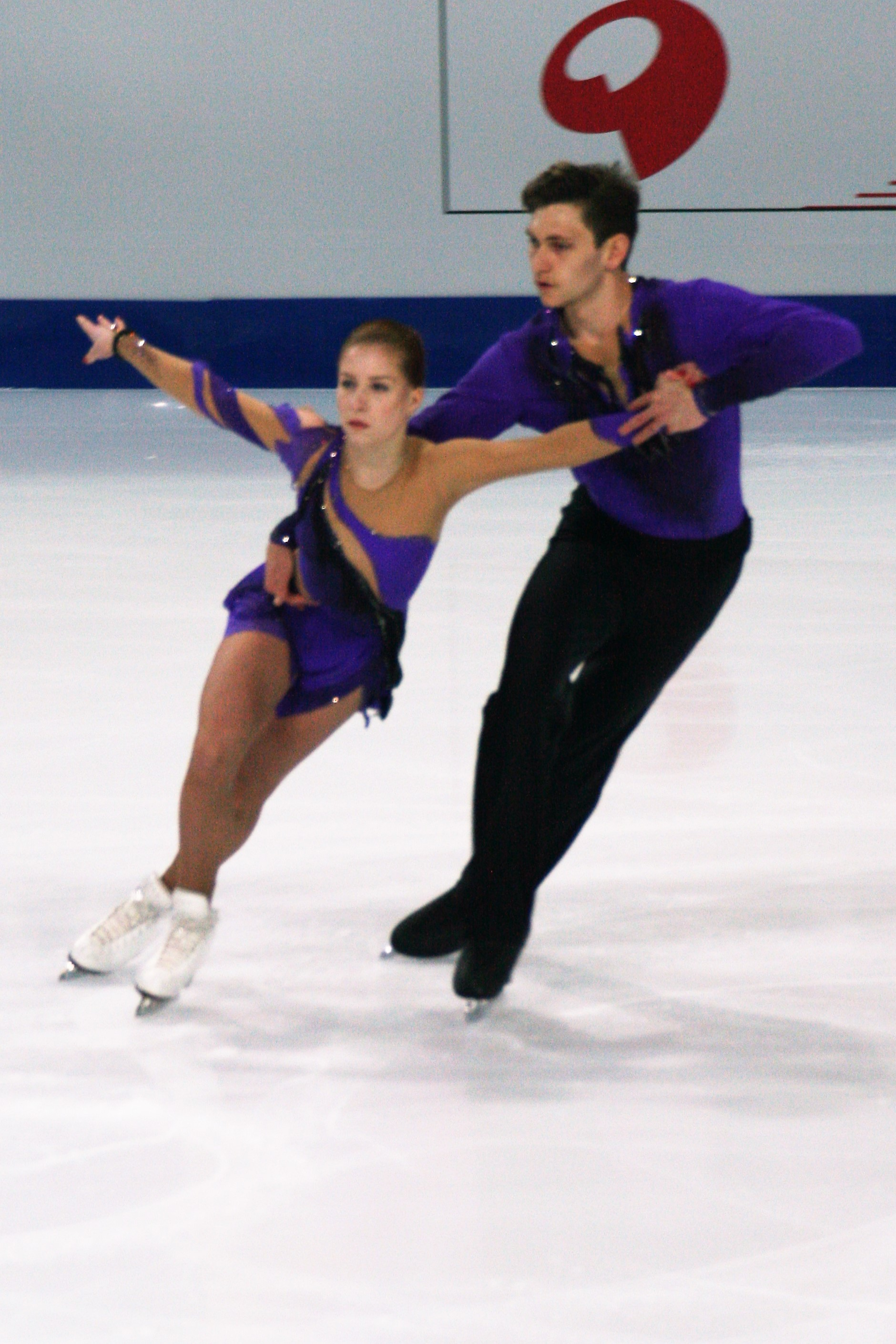 Екатерина Александровская / Харли Уиндзор (Австралия) на финале Гран-при по фигурному катанию среди юниоров 2016-2017